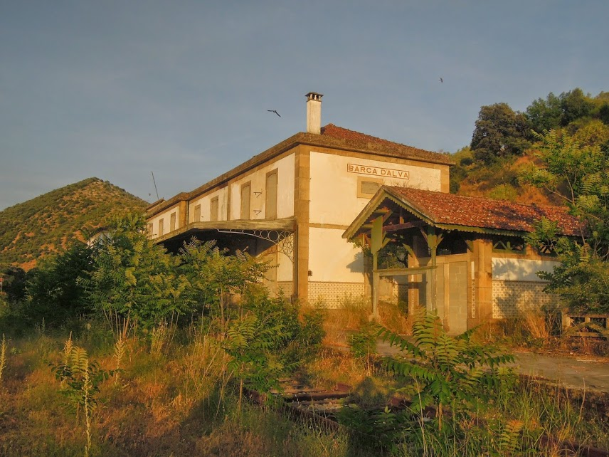 Ehemaliger Bahnhof von Barca d'Alva, Portugal